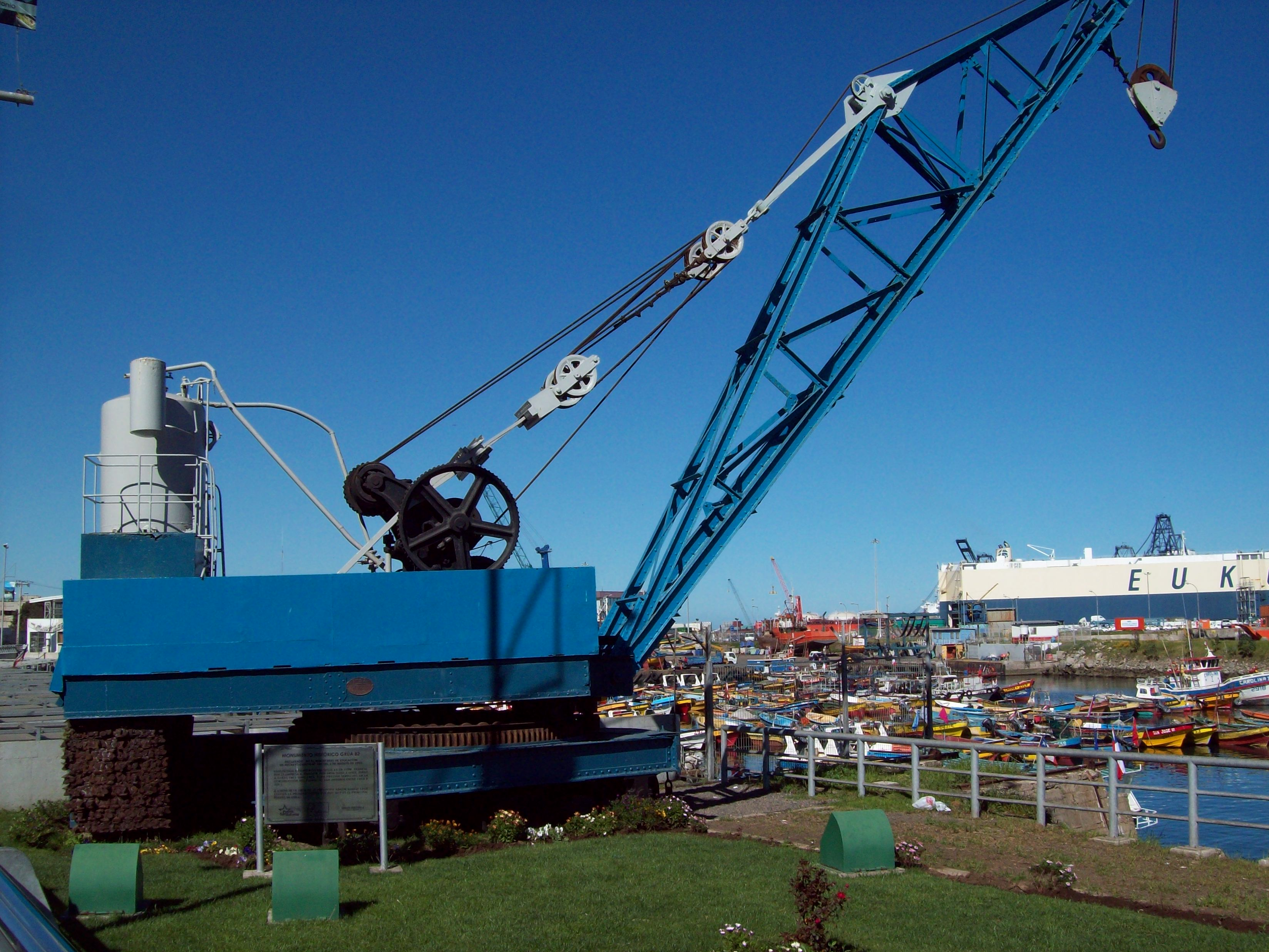 La Grúa 82 fue parte esencial en la construcción del puerto de San Antonio, a comienzos del siglo 20. This is a photo of a national monument in Chile: 632